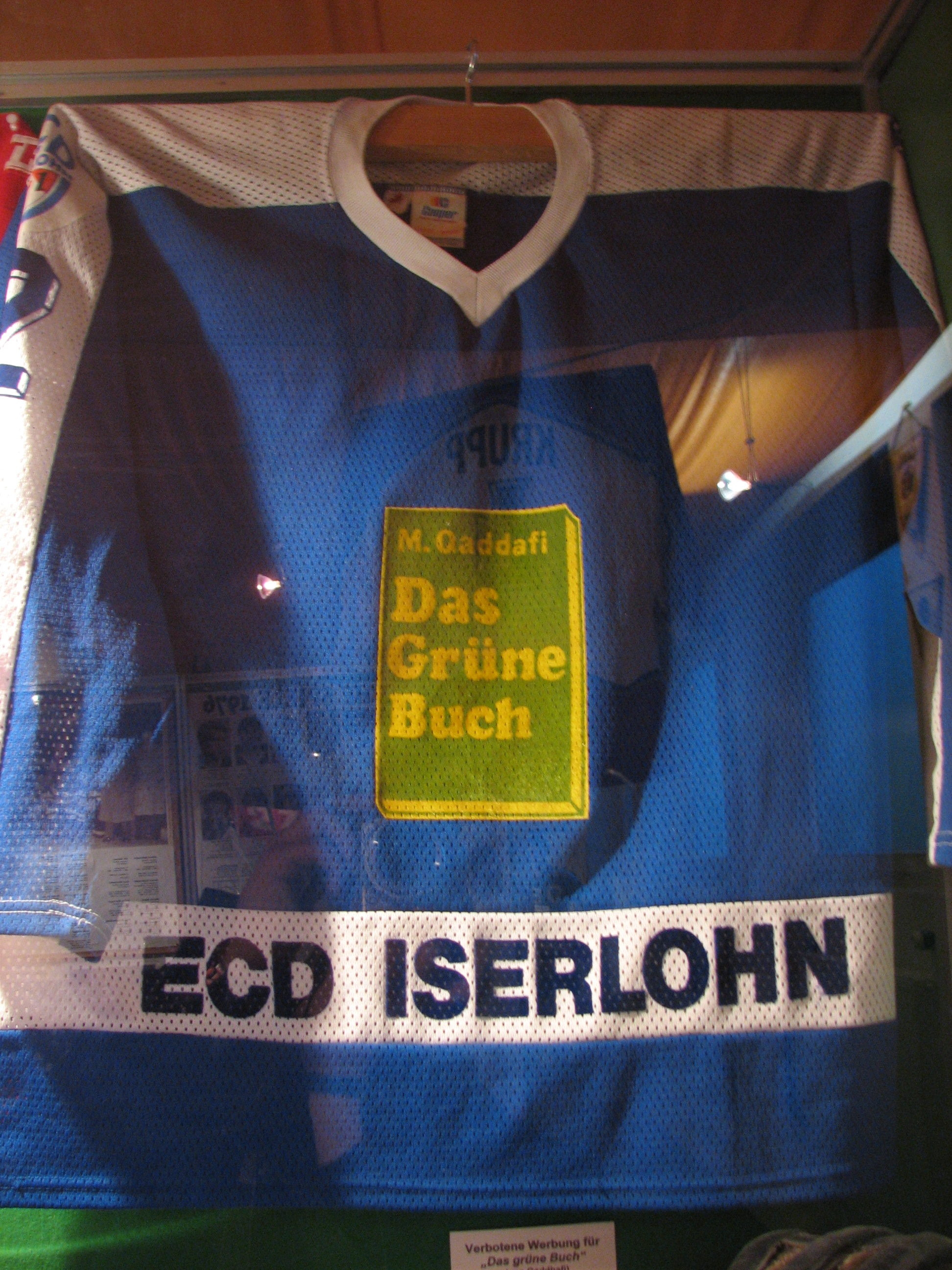 Verbotene Trikot-Werbung vom "Grünen Buch" des EC Deilinghofen im Eishockeymuseum